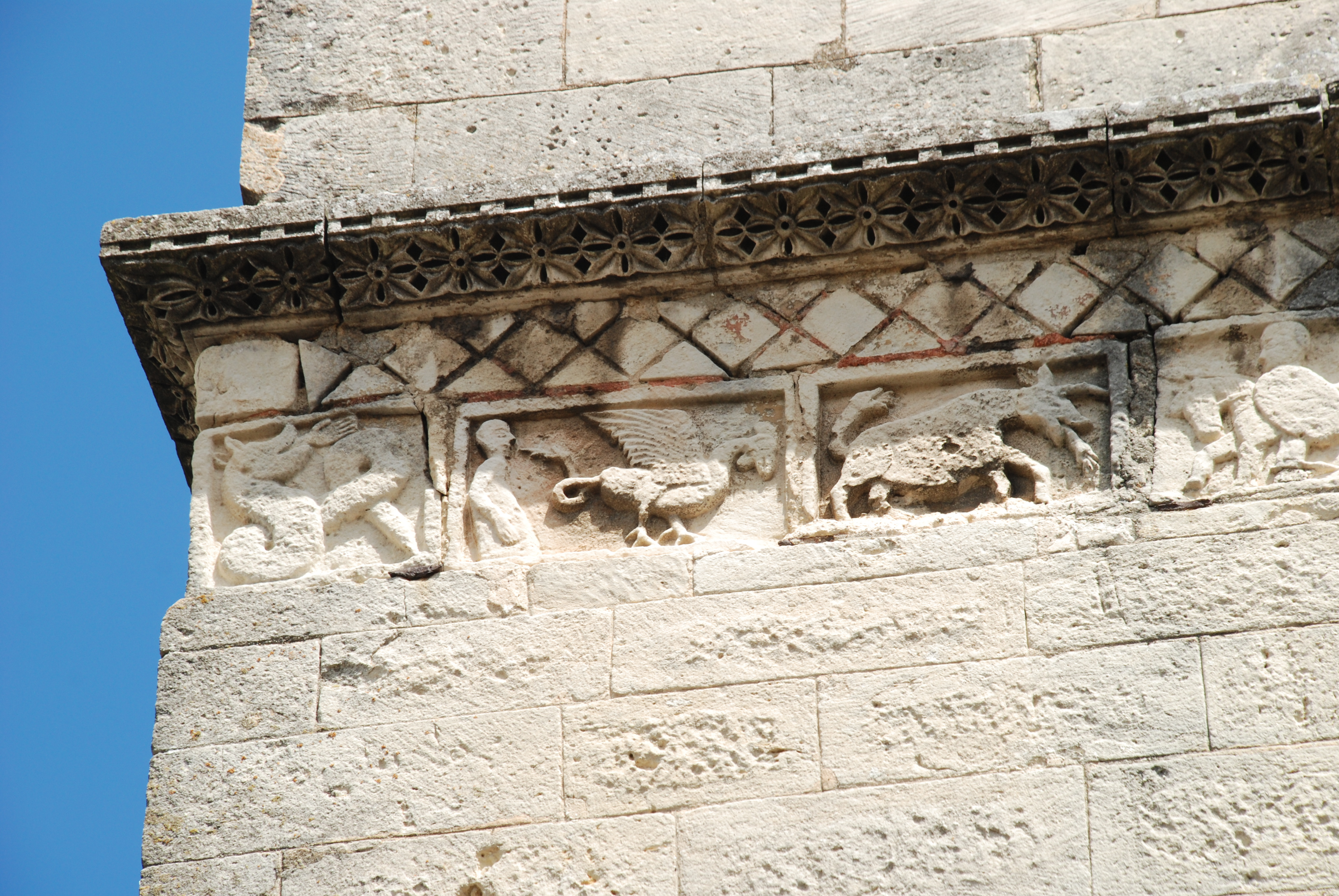 France - Drôme - Tour funéraire de Saint-Restitut - Frise romane